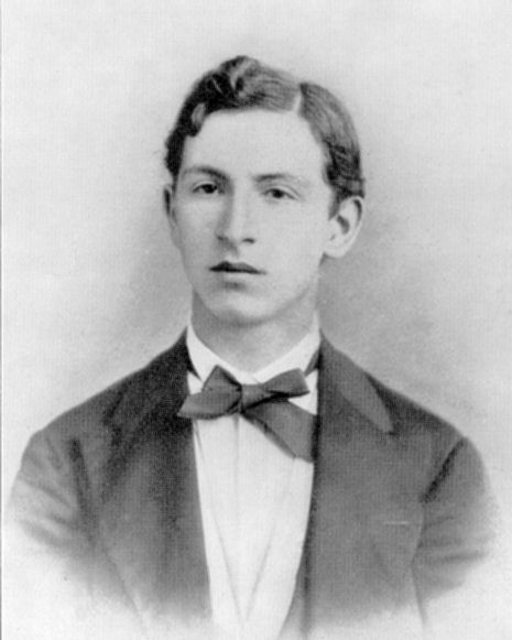 Max Steinthal